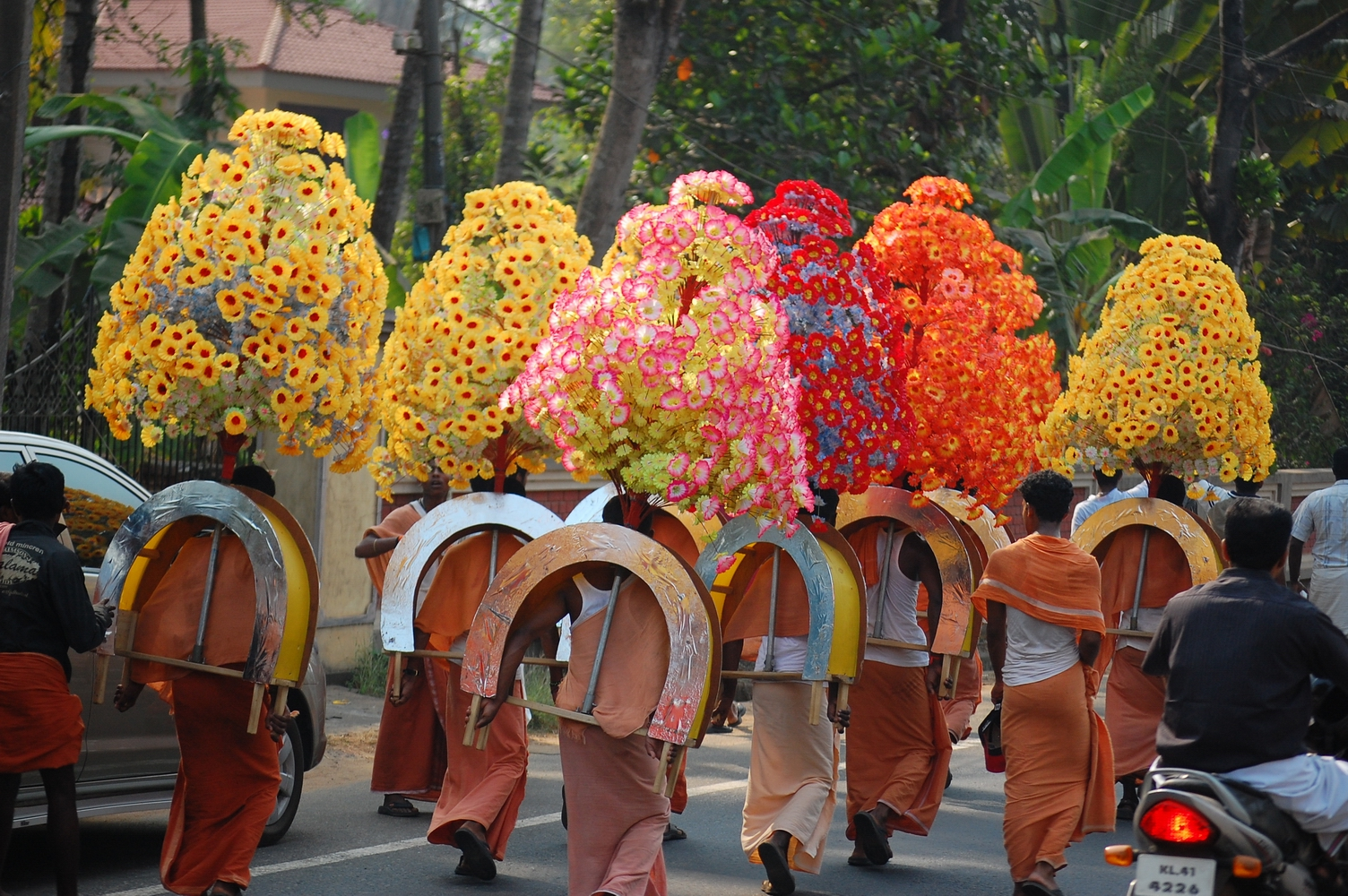 കാവടി- മുരുകന്റെ ഉത്സവവുമായി ബന്ധപ്പെട്ട ചടങ്ങ്